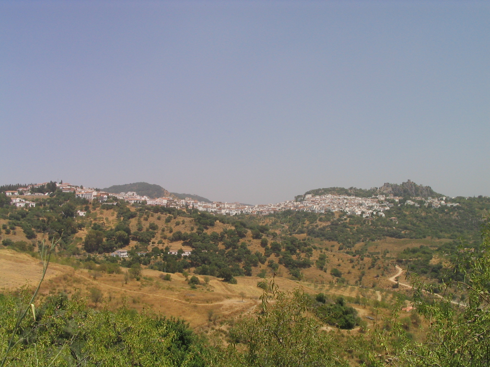 Vista de la población de Gaucín - (Málaga / Andalucía / España)